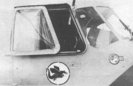 Mi-14PŁ - okno II pilota. Pod oknem godło Eskadry ZOP: skrzydlaty czarny aligator z dwiema czerwonymi bombami. Tło białe obwódka czerwona. Twórcą godła jest chor. Stanisław Szymański. (opis oryginalny)